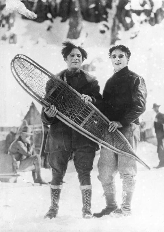 Charly Chaplin in den Wintergefilden Kanadas! Charly Chaplin (rechts), der bekannte Filmschauspieler treibt Wintersport in Kanada.